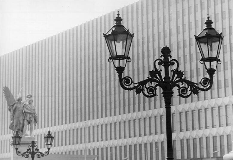 Berlin, Aussenministerium, Marx-Engels-Brücke, Skulpturen ADN-ZB Deutsche Demokratische Republik-25.3.87-rü. 750 Jahre Berlin.Dicht beisammen-alt und neu.Zum Gebäude des Ministeriums für Auswärtige Angelegenheiten der DDR-das Foto zeigt nur einen Blick auf die Fassade in zeitgemäßer Architektur-führt die Marx-Engels-Brücke,ehemals Schloßbrücke.Sie entstand nach Entwürfen Karl Friedrich Schinkels 1822 bis 1824.Reich verzierte Kandelaber und Marmorfiguren verschiedener Bildhauer lenken die Blicke der Passanten auf sich.Reporter Link